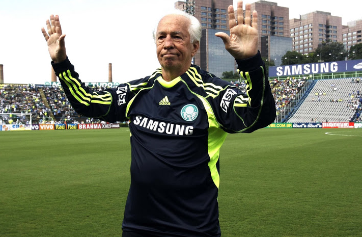 Homenagem a Valdir Joaquim de Moraes - Campeonato Paulista de 2010, Palmeiras X Mogi Mirim em 2010.